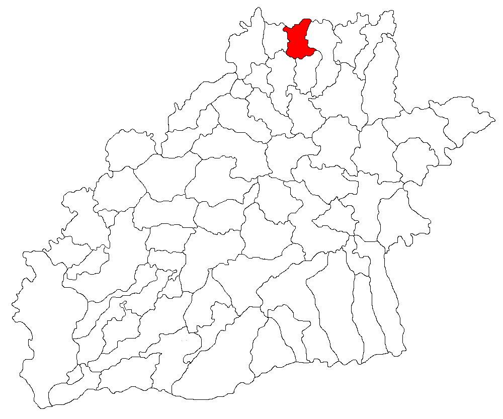 Categorie:Hărţi ale judeţului Sibiu